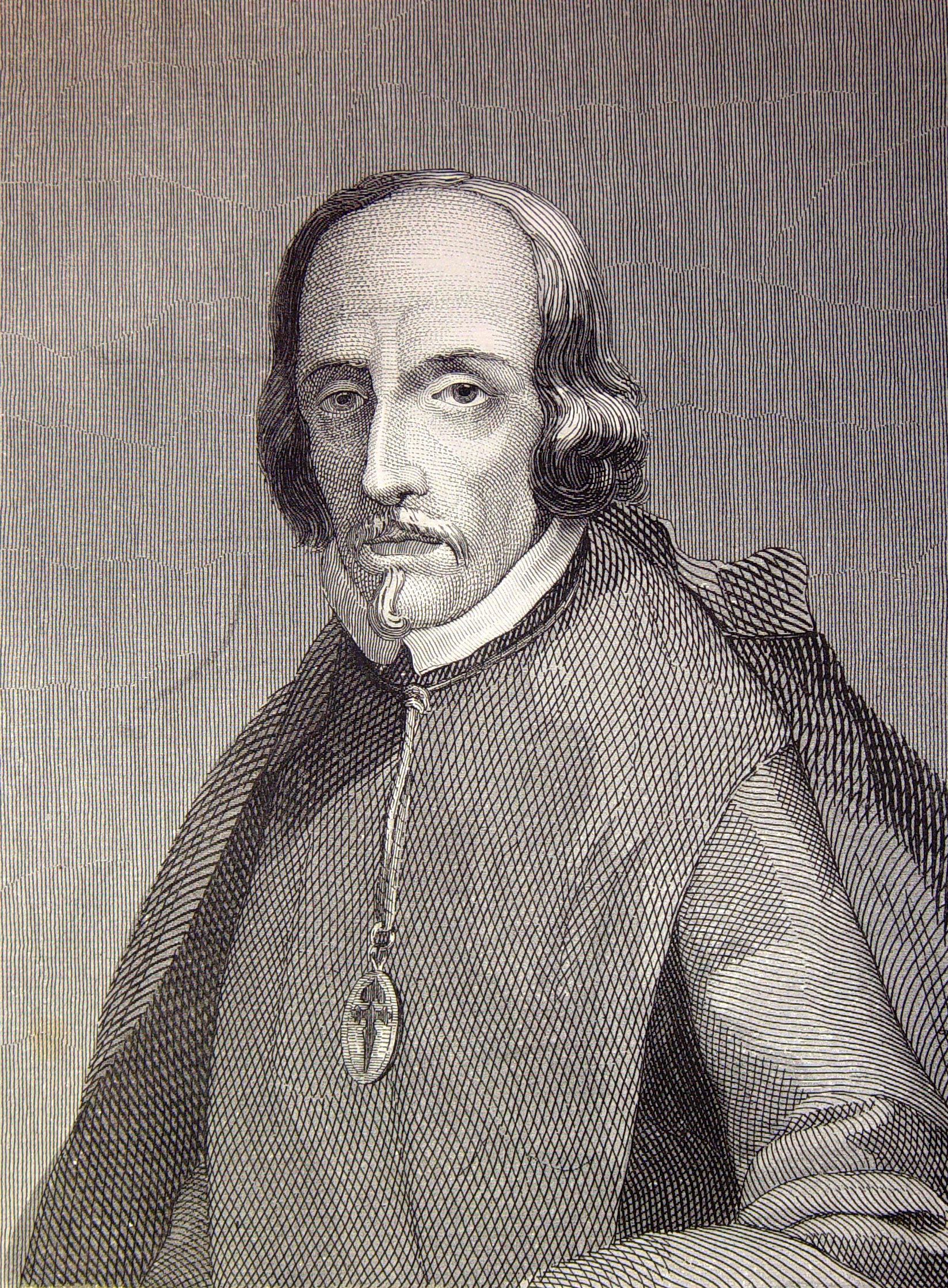 Ilustraciones pertenecientes al libro: Las glorias nacionales : grande historia universal de todos los reinos, provincias, islas y colonias de la Monarquía Española, desde los tiempos primitivos hasta el año de 1852. - Madrid [etc.] (Barcelona : Imprenta de Luis Tasso) Librería de la Publicidad [etc.], 1852-1854.